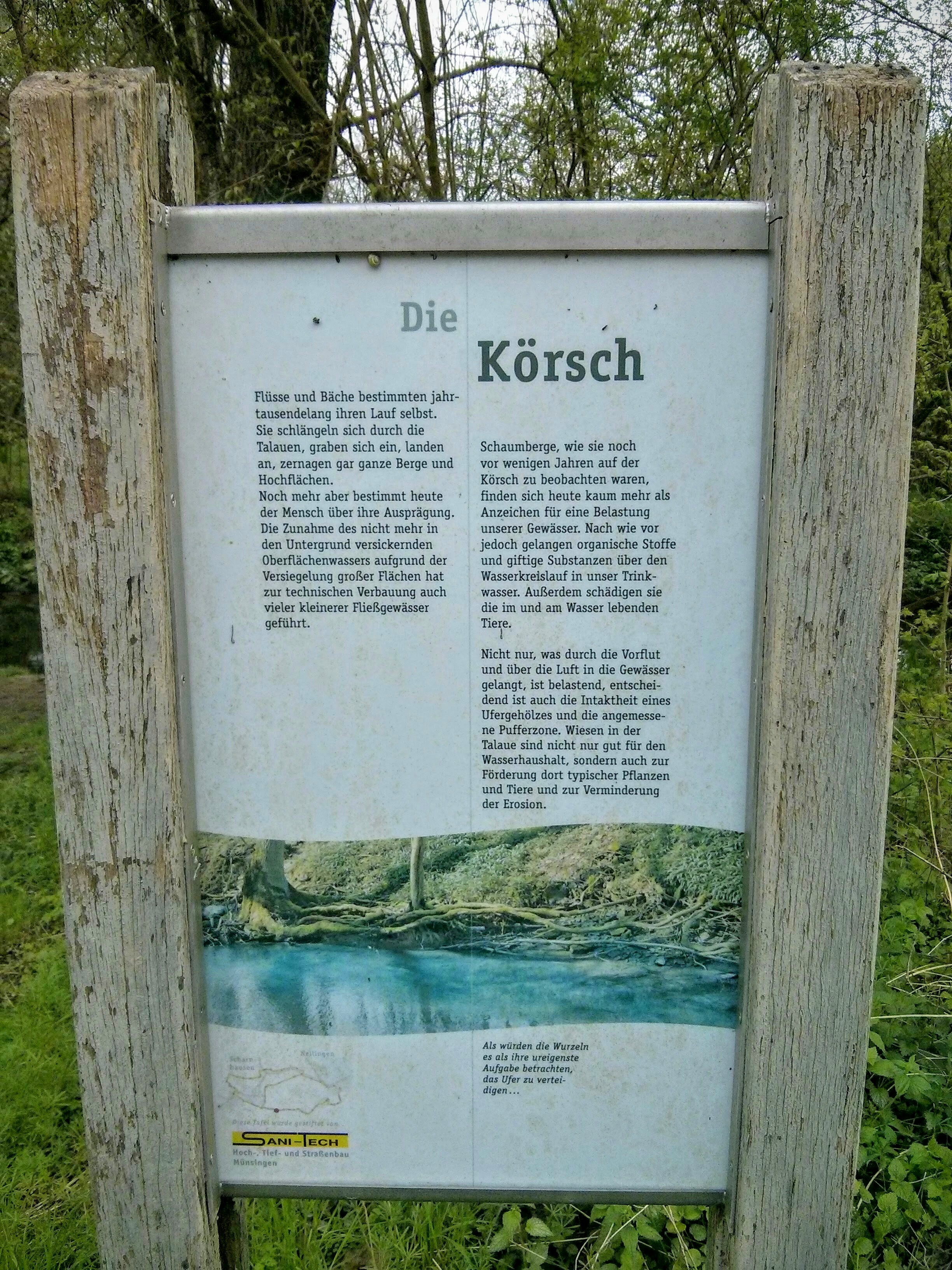 Informationstafel zur Körsch im Körschtal (Baden-Württemberg)